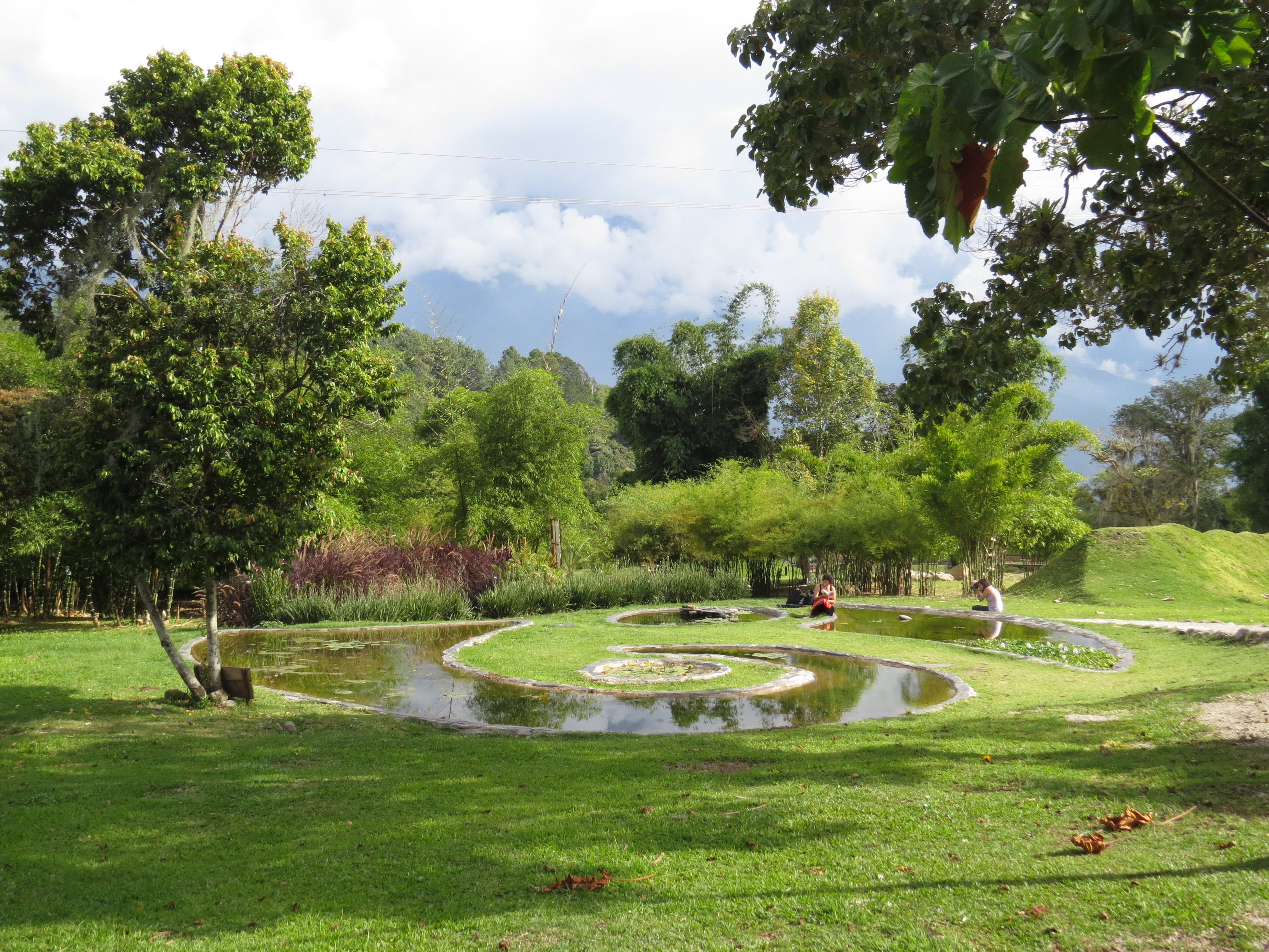 Entrada Jardín Botánico Mérida